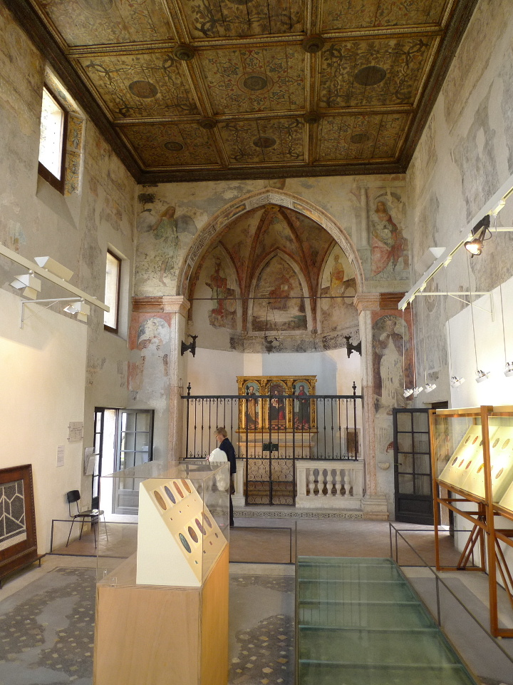 ehe. Kapelle des Klosters des Hl. Hieronymus - heute: Archäologisches Museum im Römischen Theater in Verona